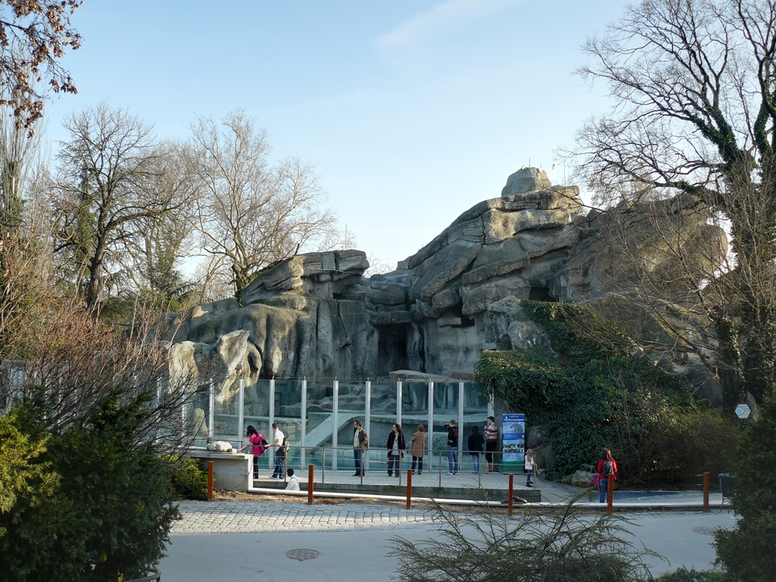 Fővárosi Állatkert, a Kis-szikla oldalában lévő sarkvidéki panoráma (Budapest)